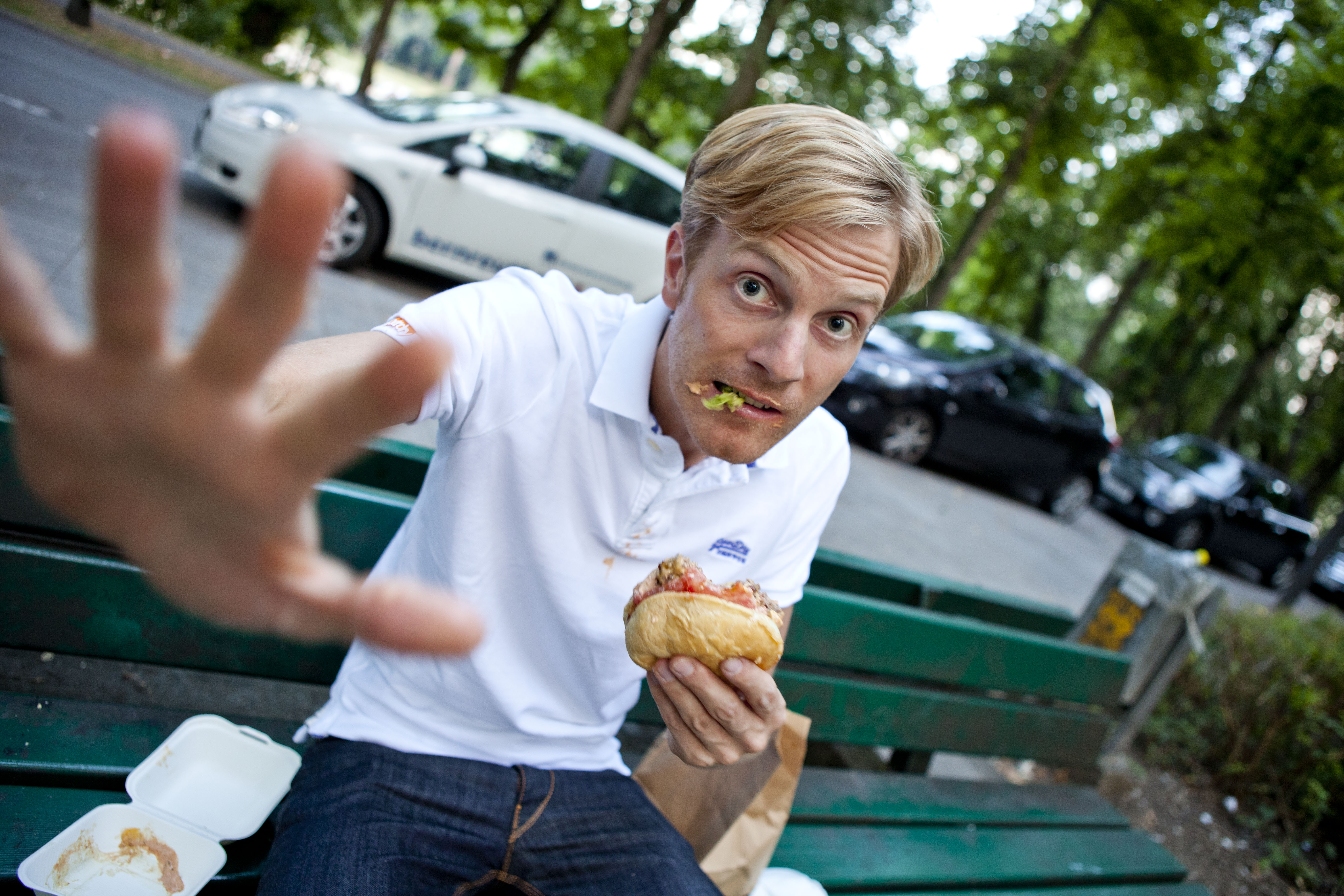 Als Zeichen gegen geschönte Wikipediafotos von Moderatoren stellt Philipp Walulis ein unvorteilhaftes Foto von sich ins Internet.